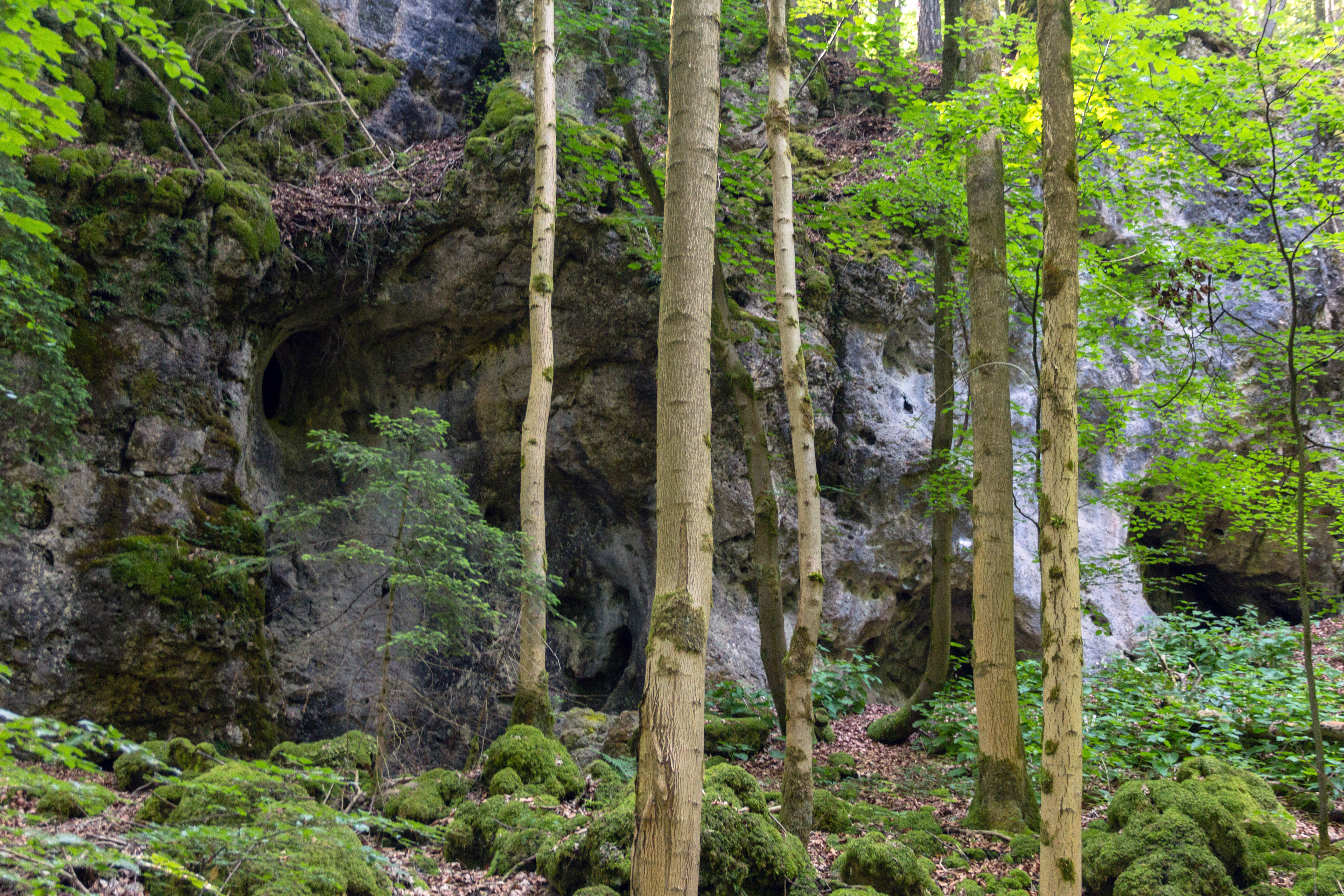 Kirchengrotten von Engelhardsberg, Geotop und Naturdenkmal